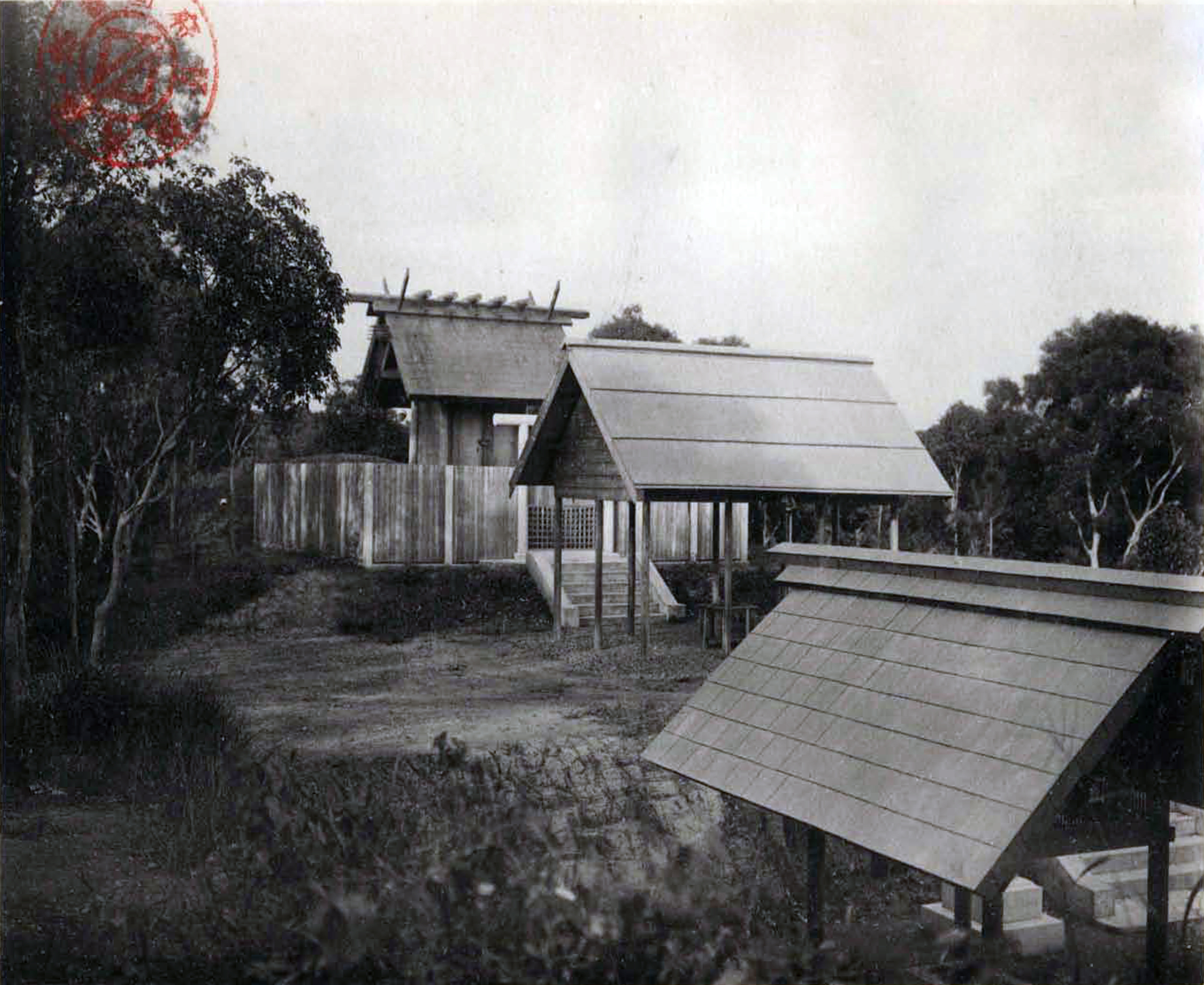 新化神社，翻拍自1929年版的《新化郡概況》。圖片中上有書頁背面透過來的新化郡役所圖像。